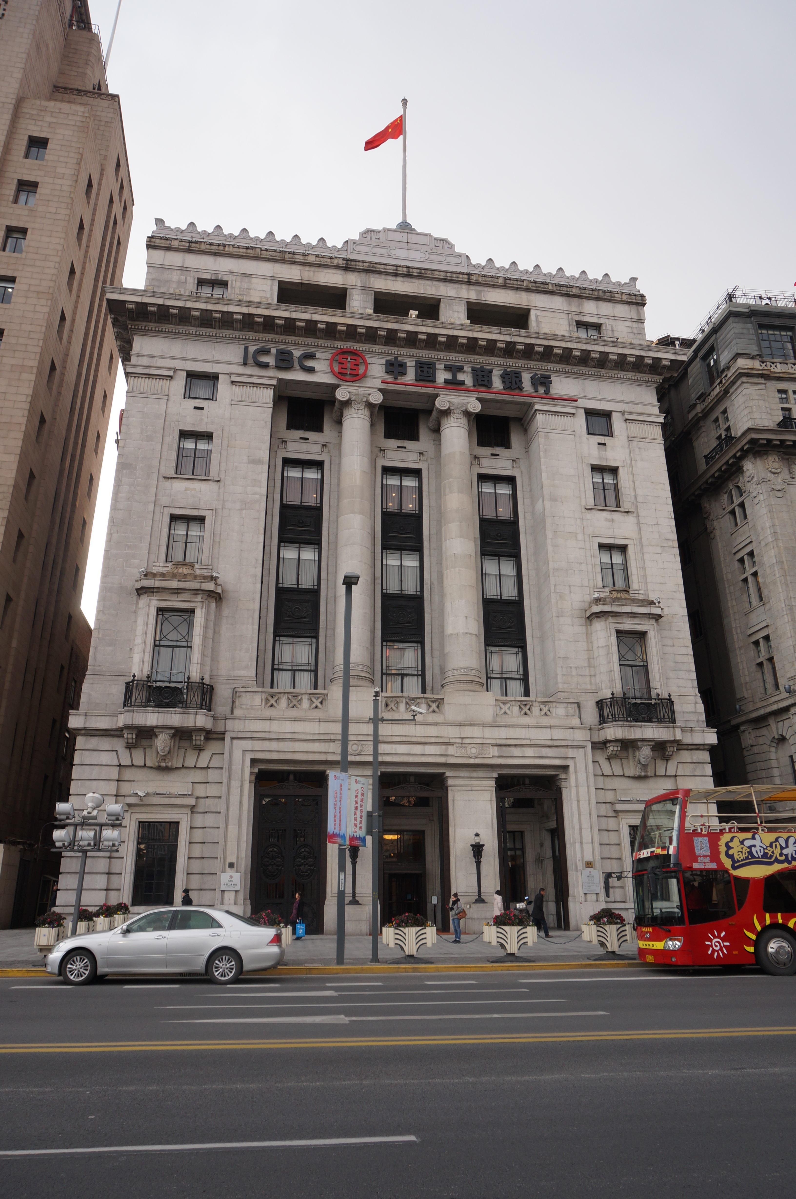 中文（中国大陆）: 外滩横滨正金银行大楼